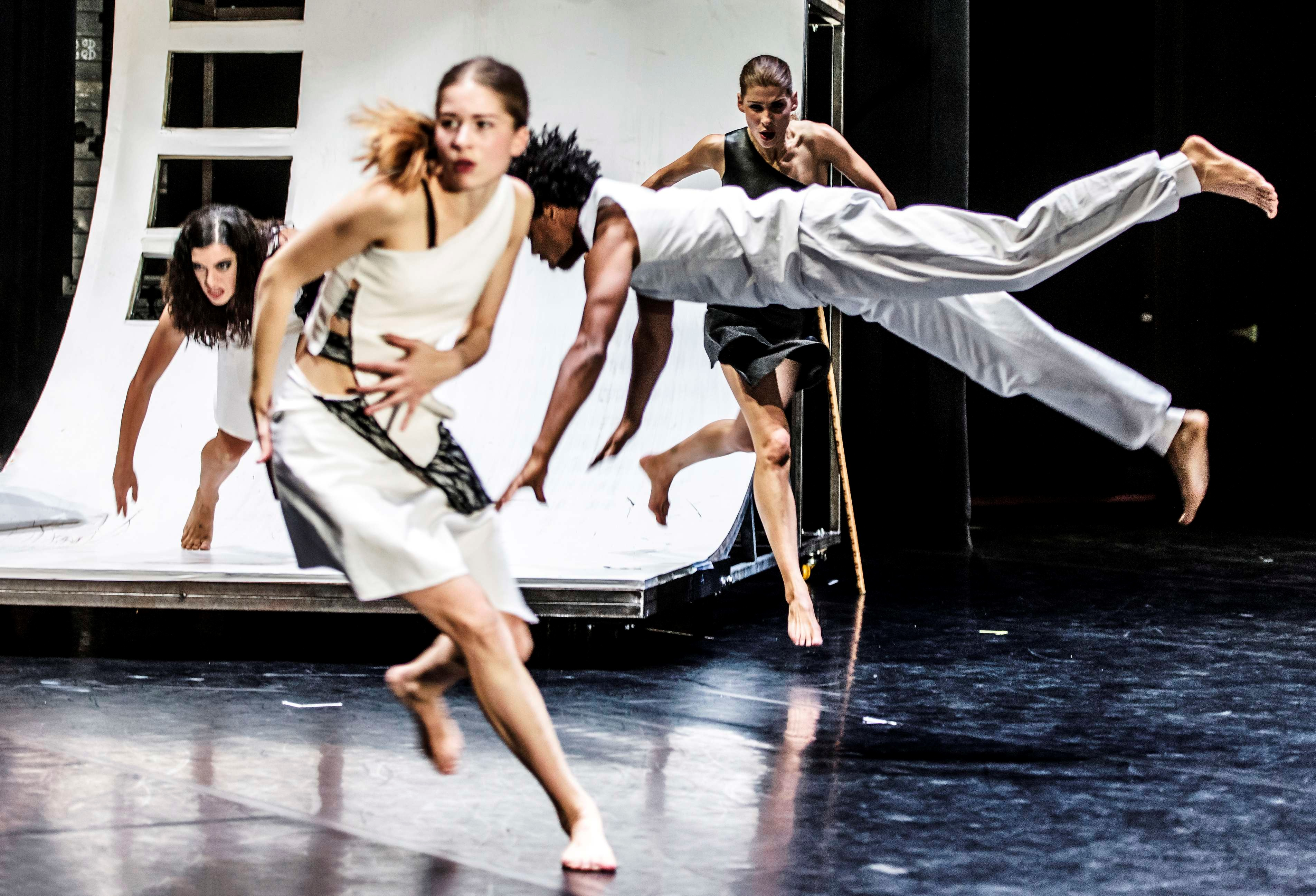 Romeo und Julia 2016 Fotograf: Lutz Edelhoff